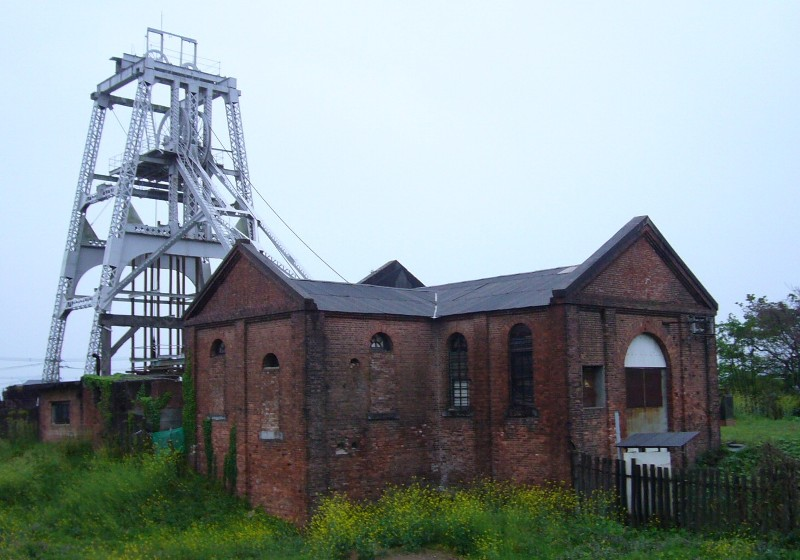 宮原坑は、三井三池炭鉱における明治後期から昭和初頭にかけての主力坑の一つです。明治３４（１９０１）年建造の第二立坑の巻上機室（れんが建物）と立坑櫓（総鋼鉄製）が完全な状態で残されており、国の重要文化財及び史跡に指定されています。